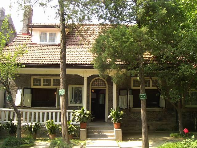 梅園新村紀念館 中国共産党代表団事務所跡 2004年5月22日撮影 撮影者:権作 参照： 梅园新村30号，中国共产党代表团办事处旧址，南京